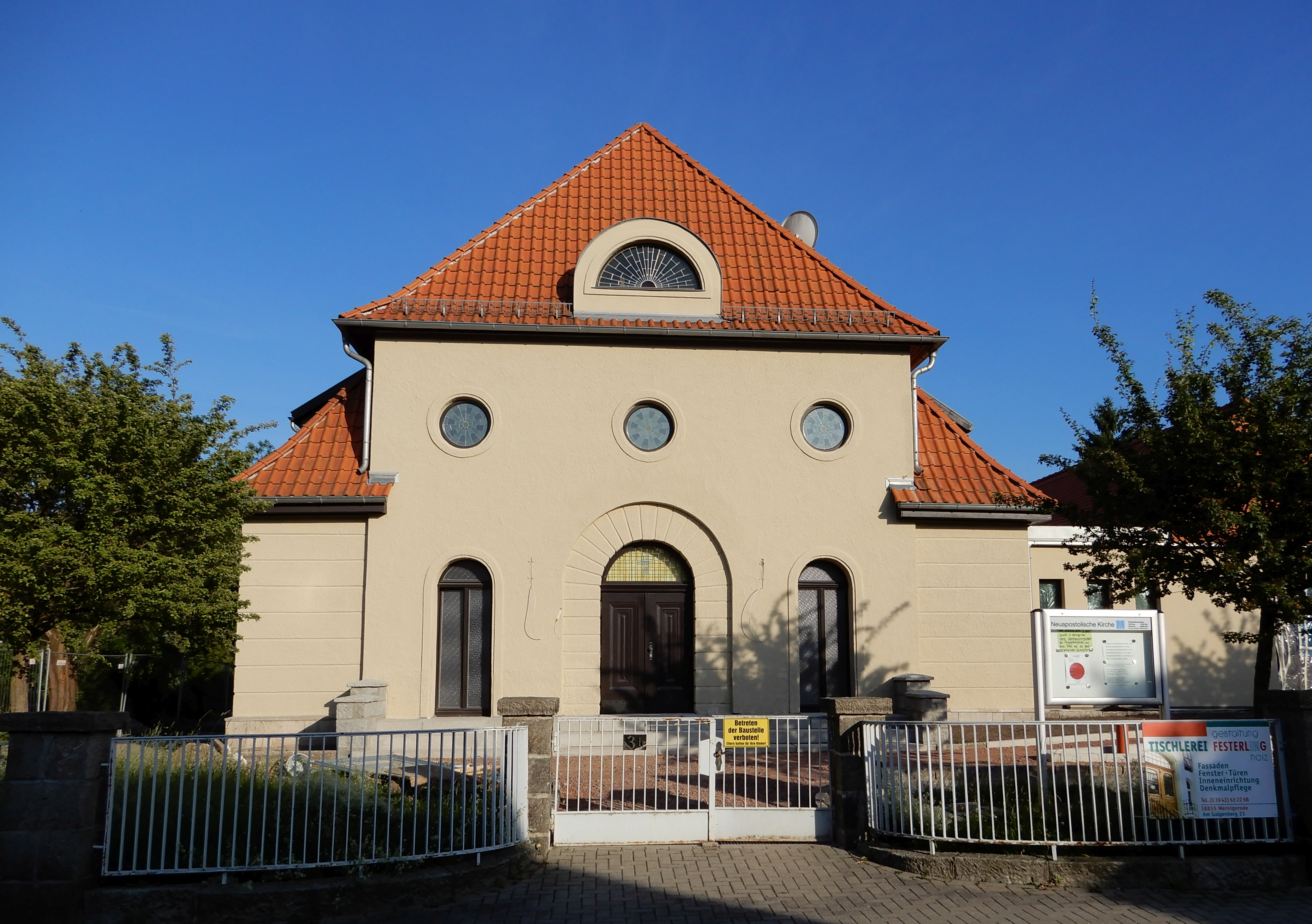 Kirche der Neuapostolischen Gemeinde Wernigerode in der Lüttgenfeldstraße in Hasserode